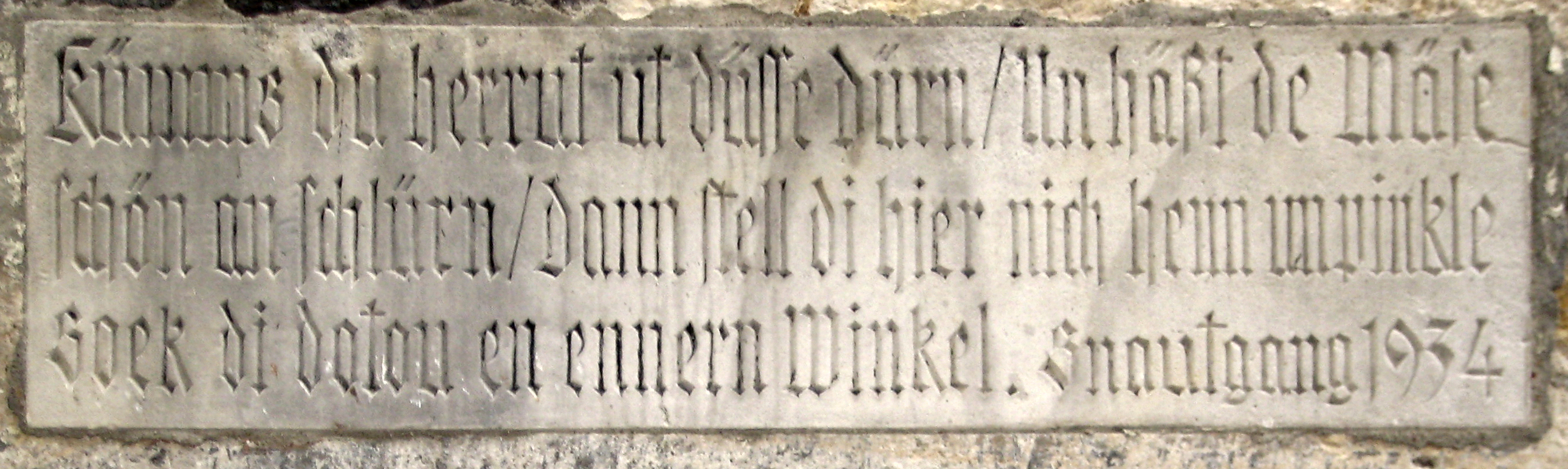 Schnatgangstein am Hotel Walhalla in Osnabrück Original Uploaded with Reworkhelper